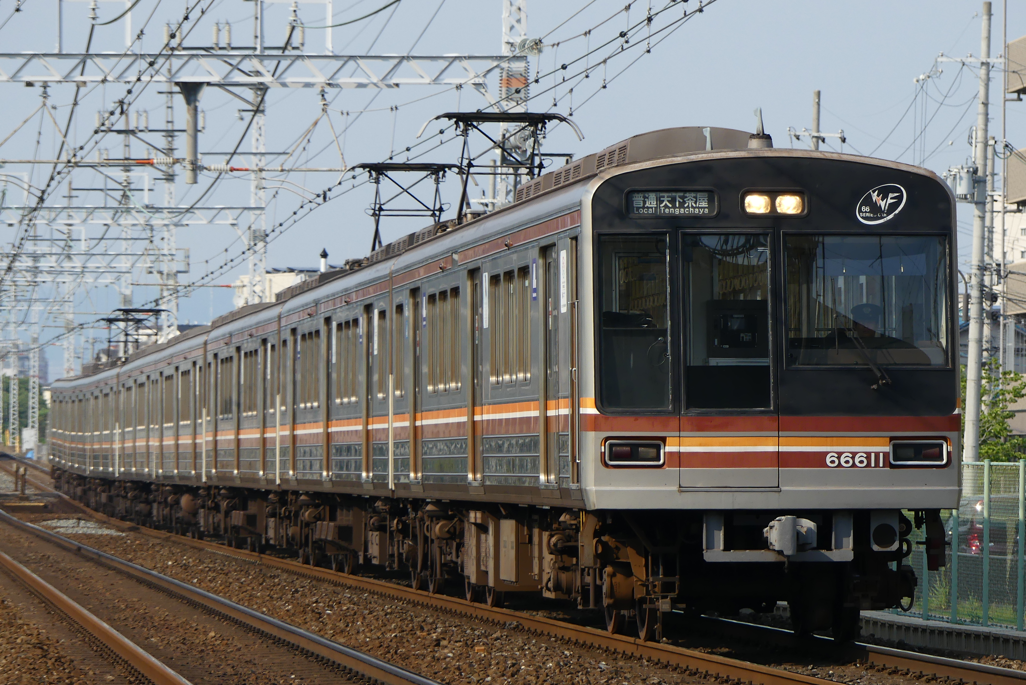 阪急京都線内を走行する66系電車